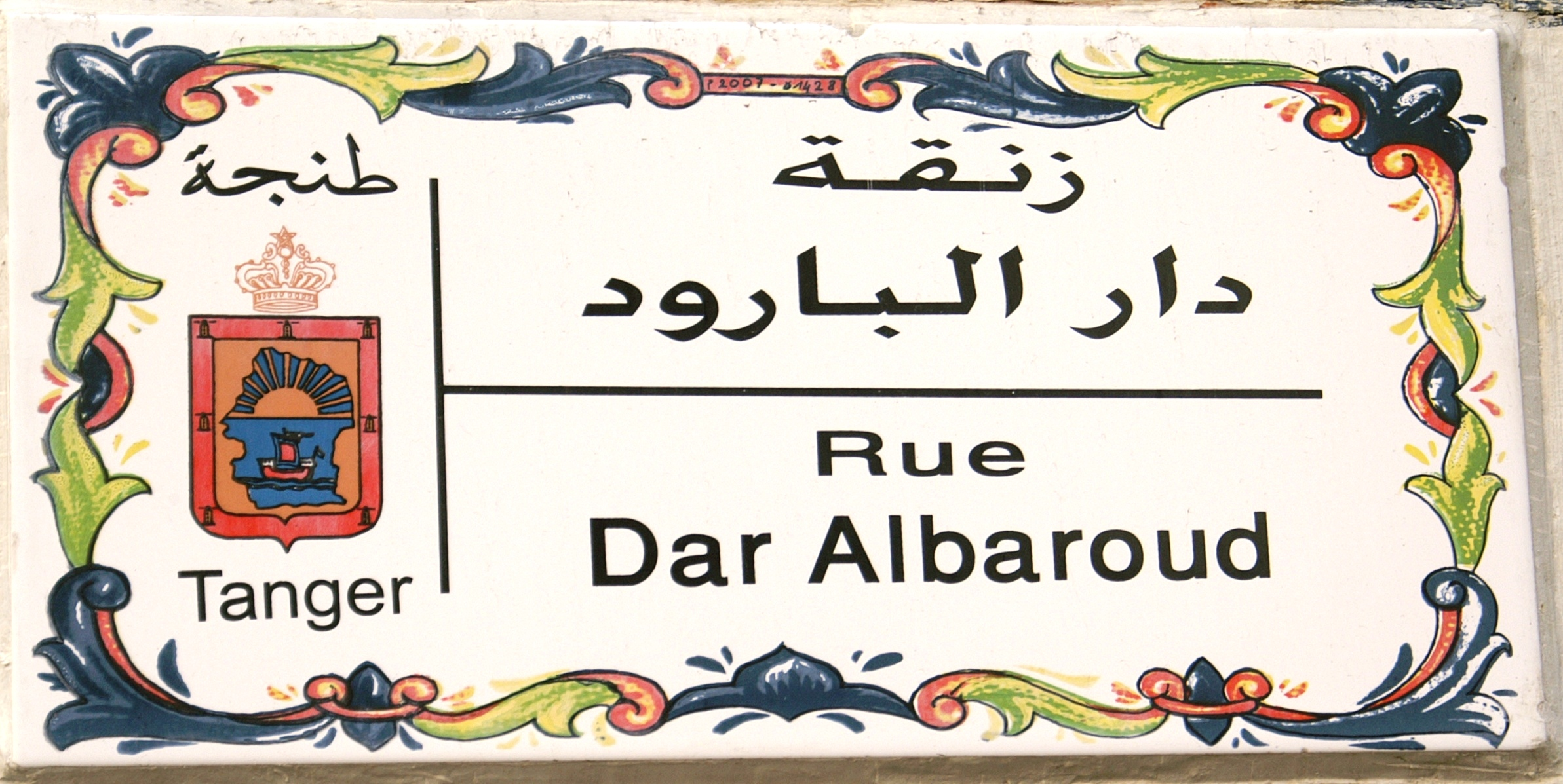 Straatnaam bord Tanger Marokko (Rue Dar Albaroud)